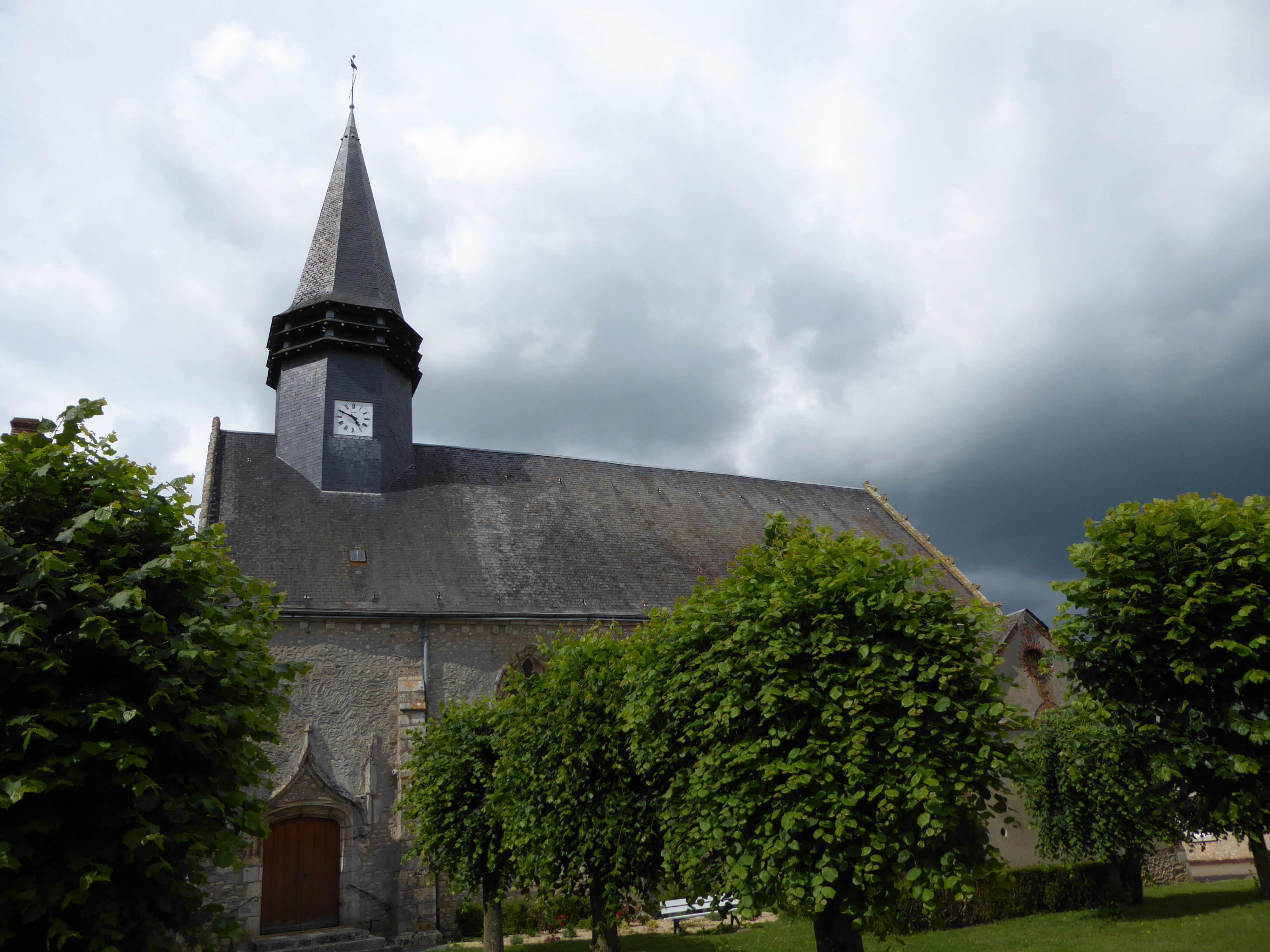 église Saint-Martin, Neuvy-en-Dunois, Eure-et-Loir, France.